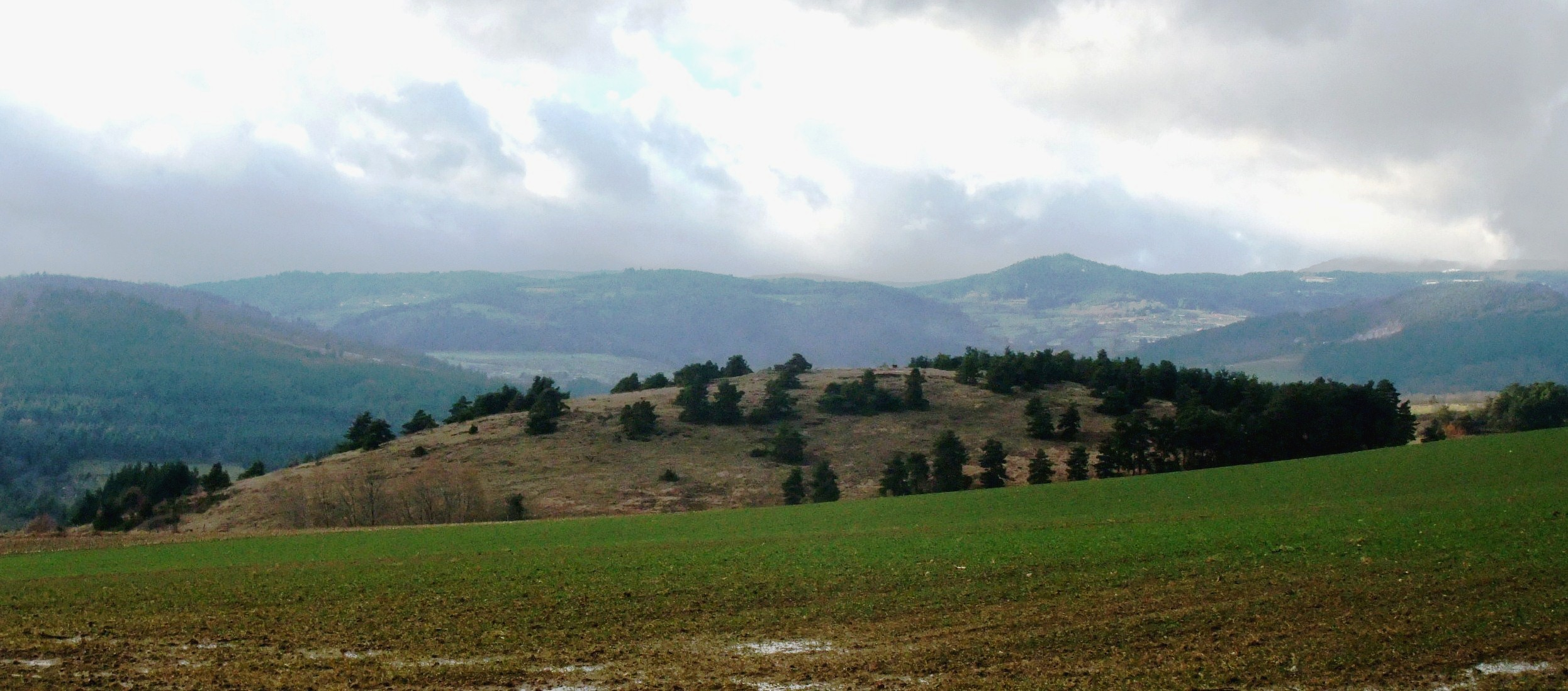 Savas suc de Clava